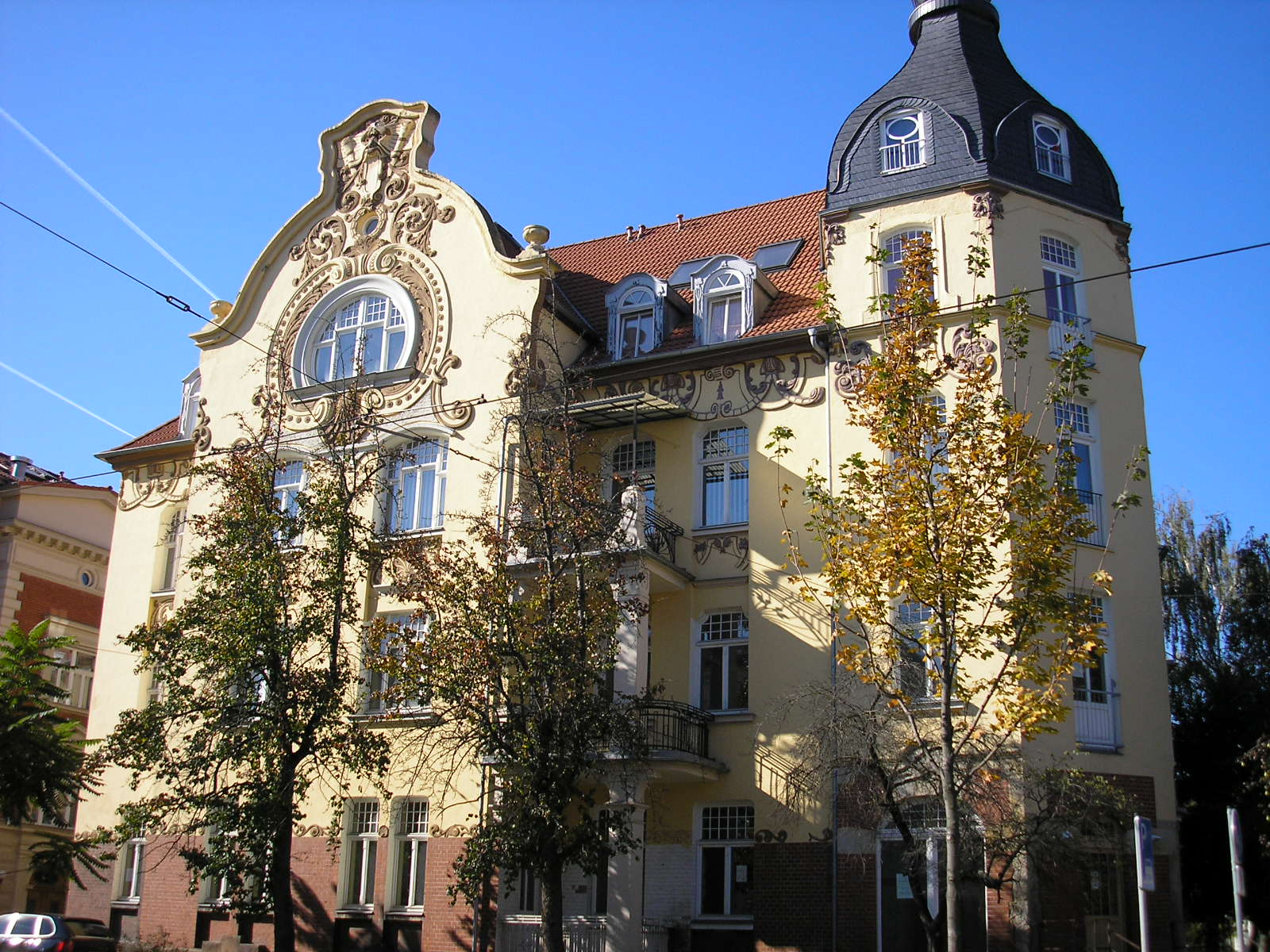 Eckhaus Steigerstraße/Reichartstr., Ansicht von der Steigerstr.